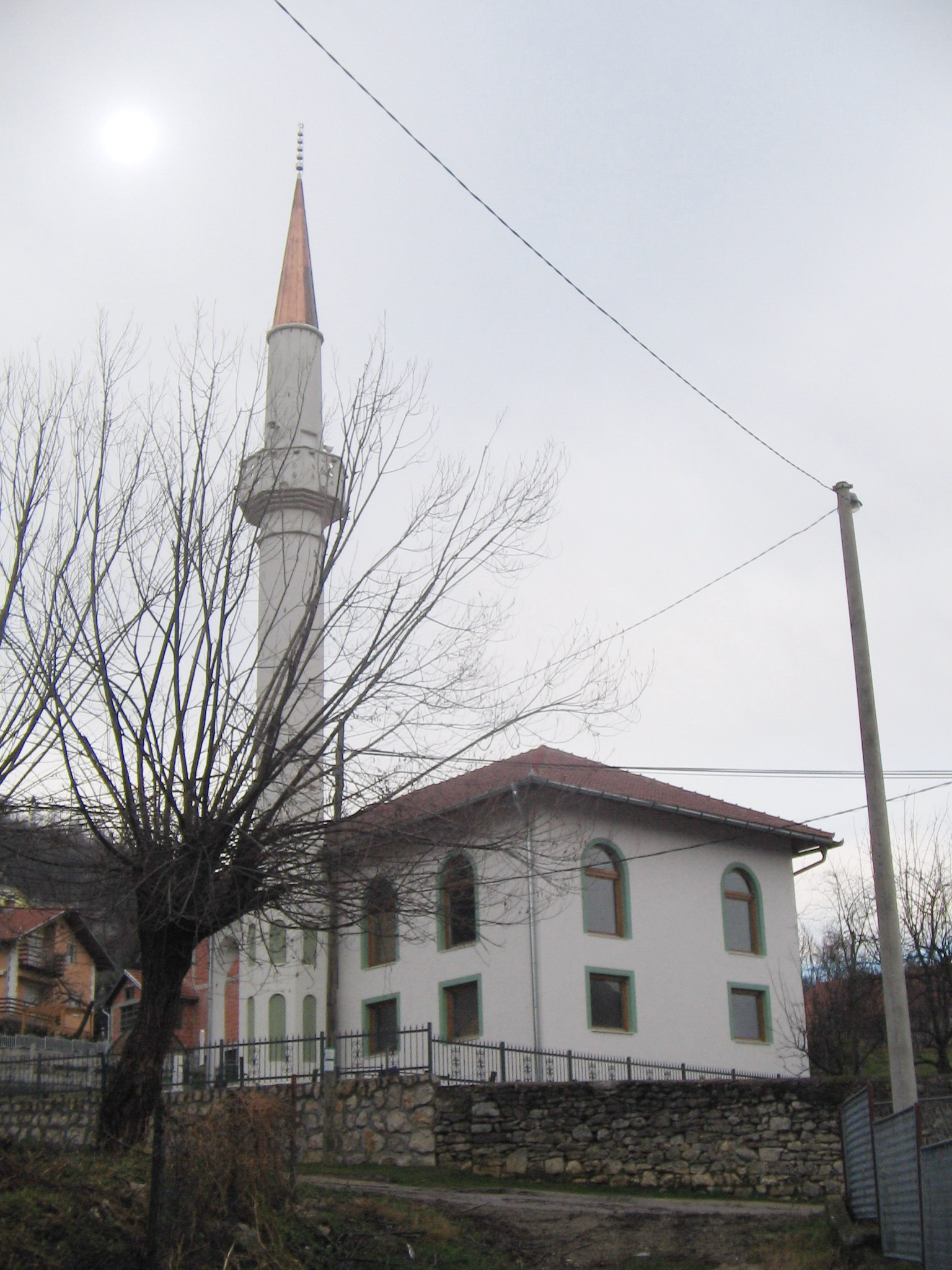 Џамија на брду код Шехера (Бања Лука)